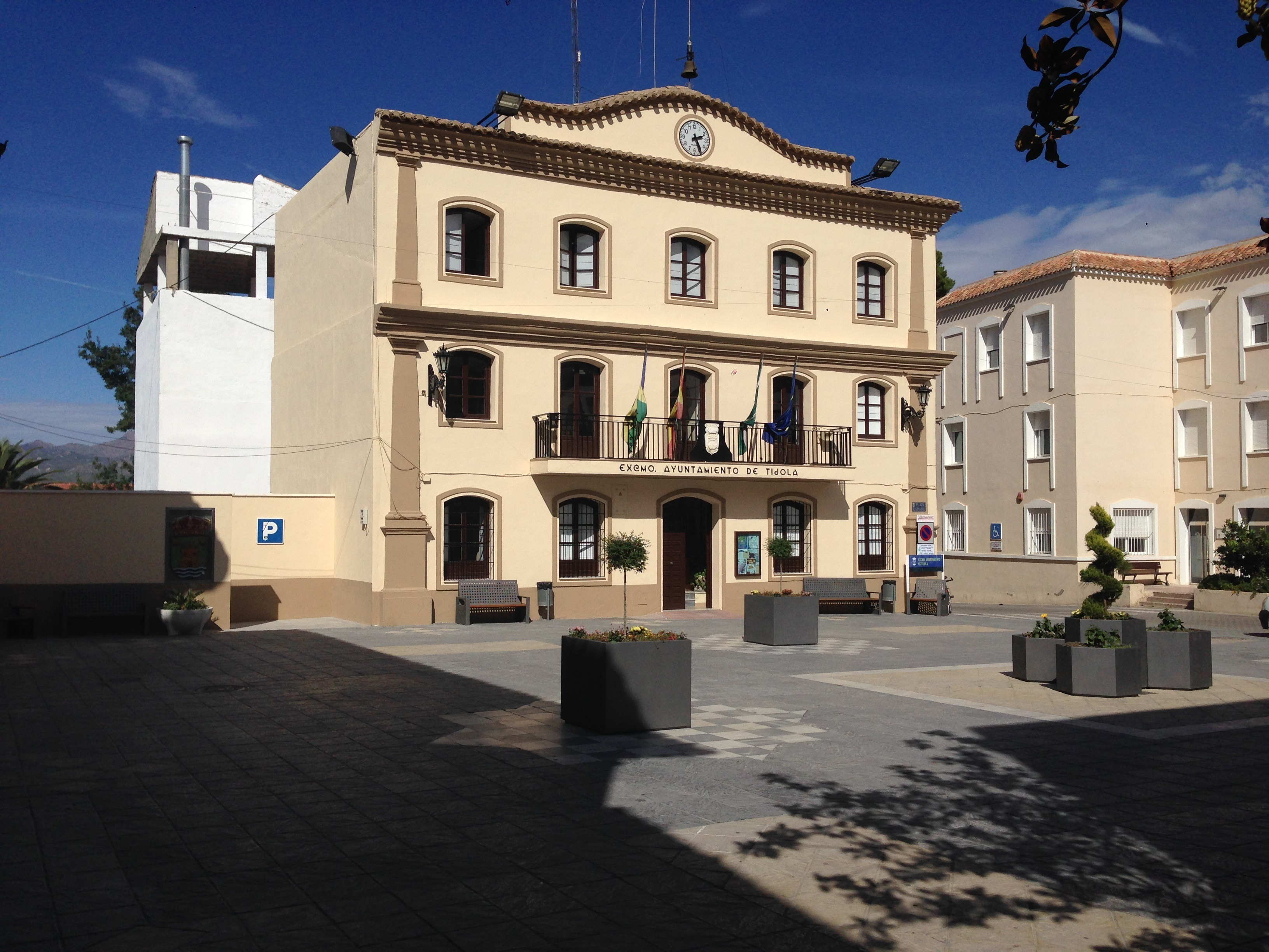 Ayuntamiento de Tíjola. Octubre 2013